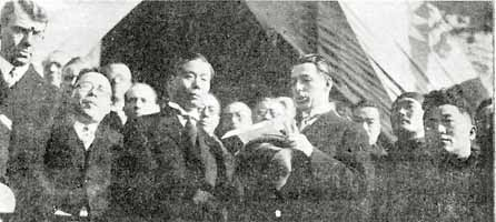 1931年1月15日国民政府收回天津比利时租界。